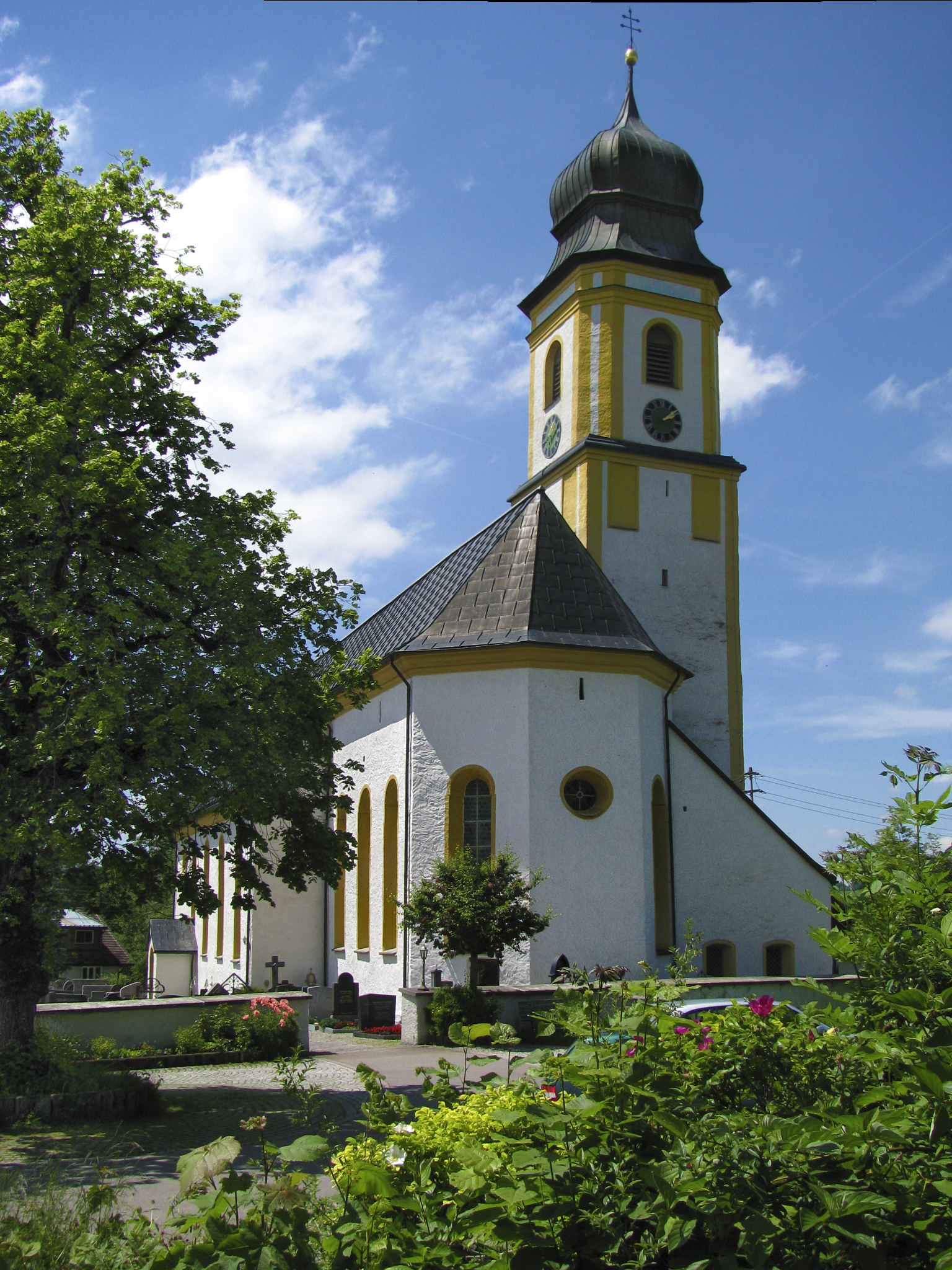 Pfarrkirche St. Peter und Paul in Petersthal, Gemeinde Oy-Mittelberg, Landkreis Oberallgäu